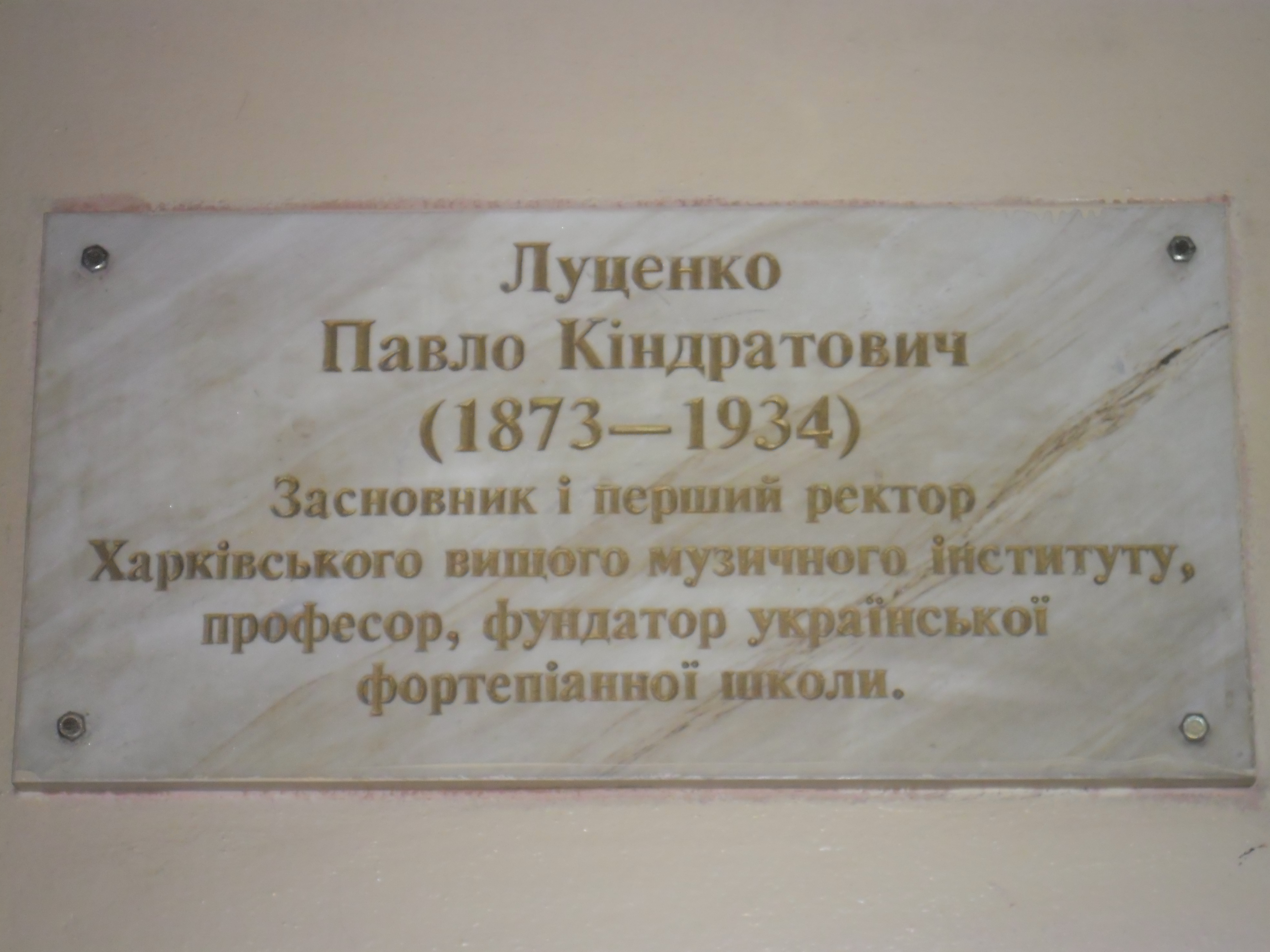 Мемориальная доска в честь Павла Кондратьевича Луценко в Харьковском университете искусств.